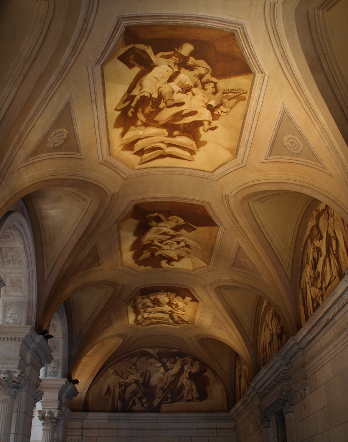 Escala d'honor (Ajuntament de Barcelona)